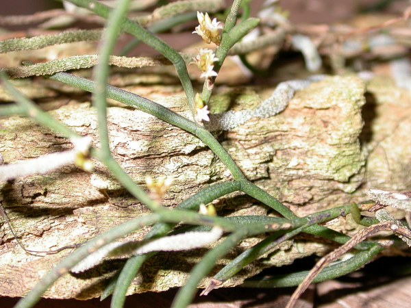 Campylocentrum aciculatum de Minas Gerais